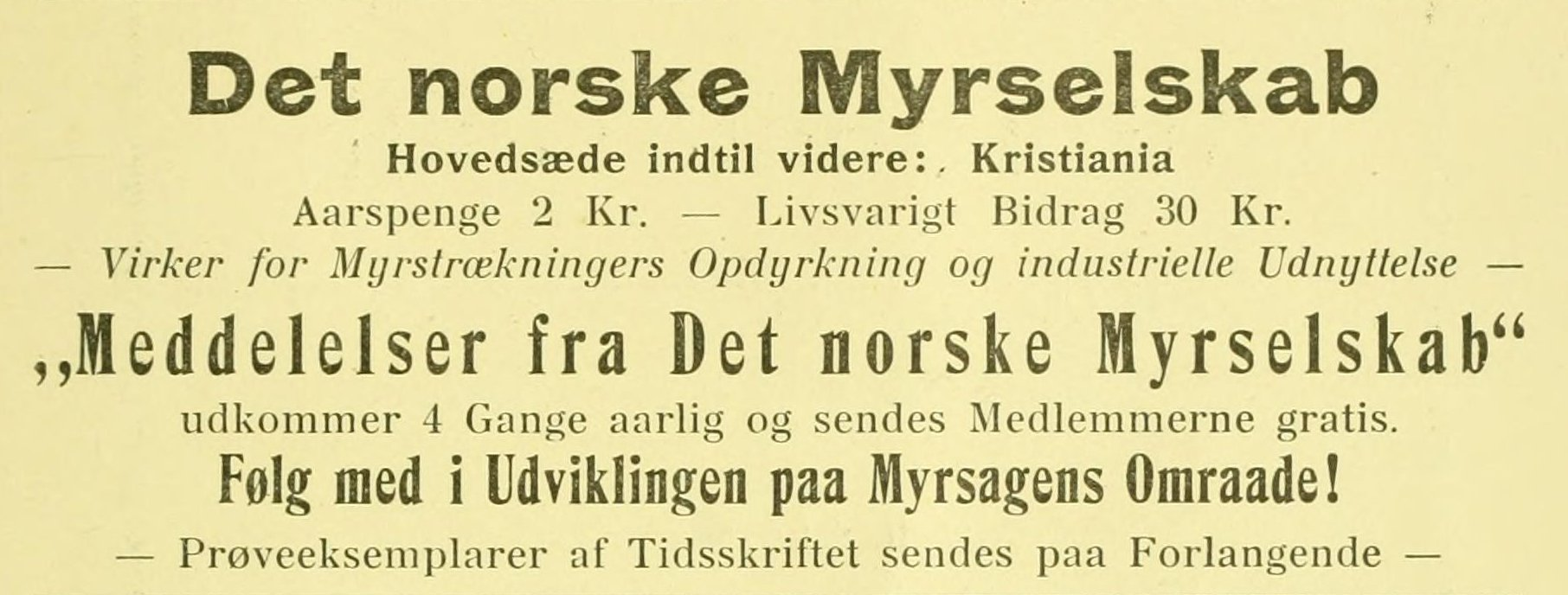 Reklame for Det norske myrselskab i tidsskriftet Naturen, 1908.